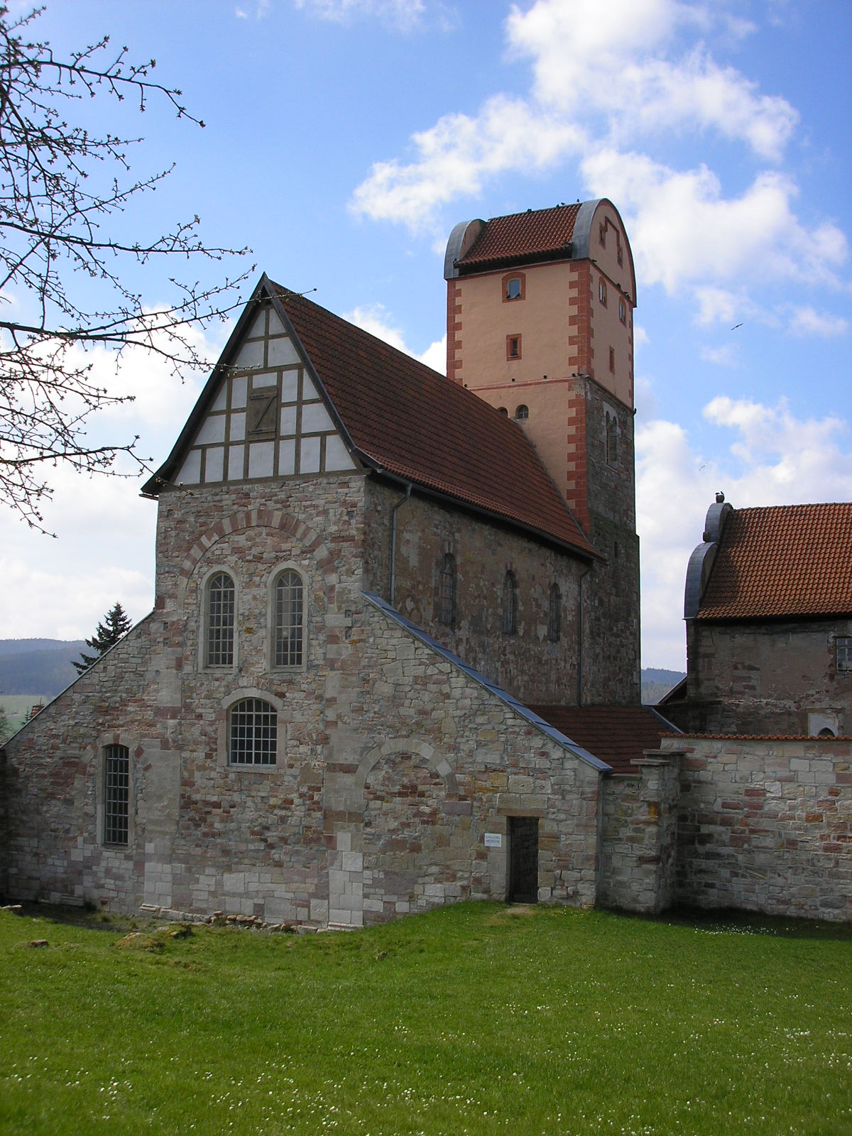 Die Klosterkirche von Herrenbreitungen (Thüringen).